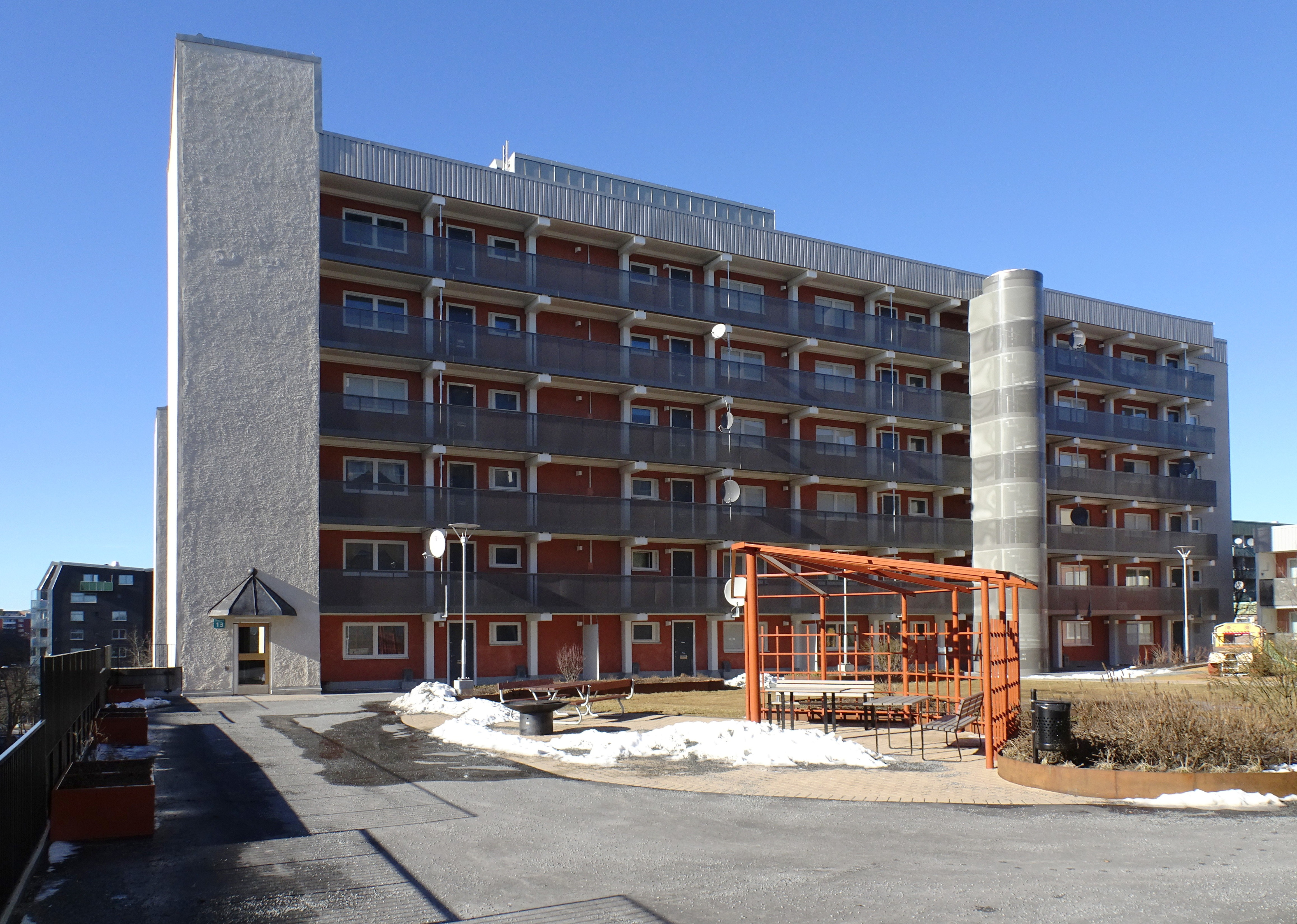 Kämpingebacken 13, fasad